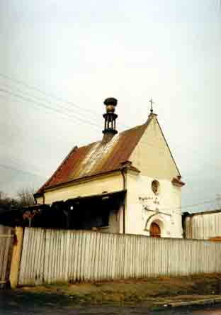 Вибранівка (біля Бібрки)